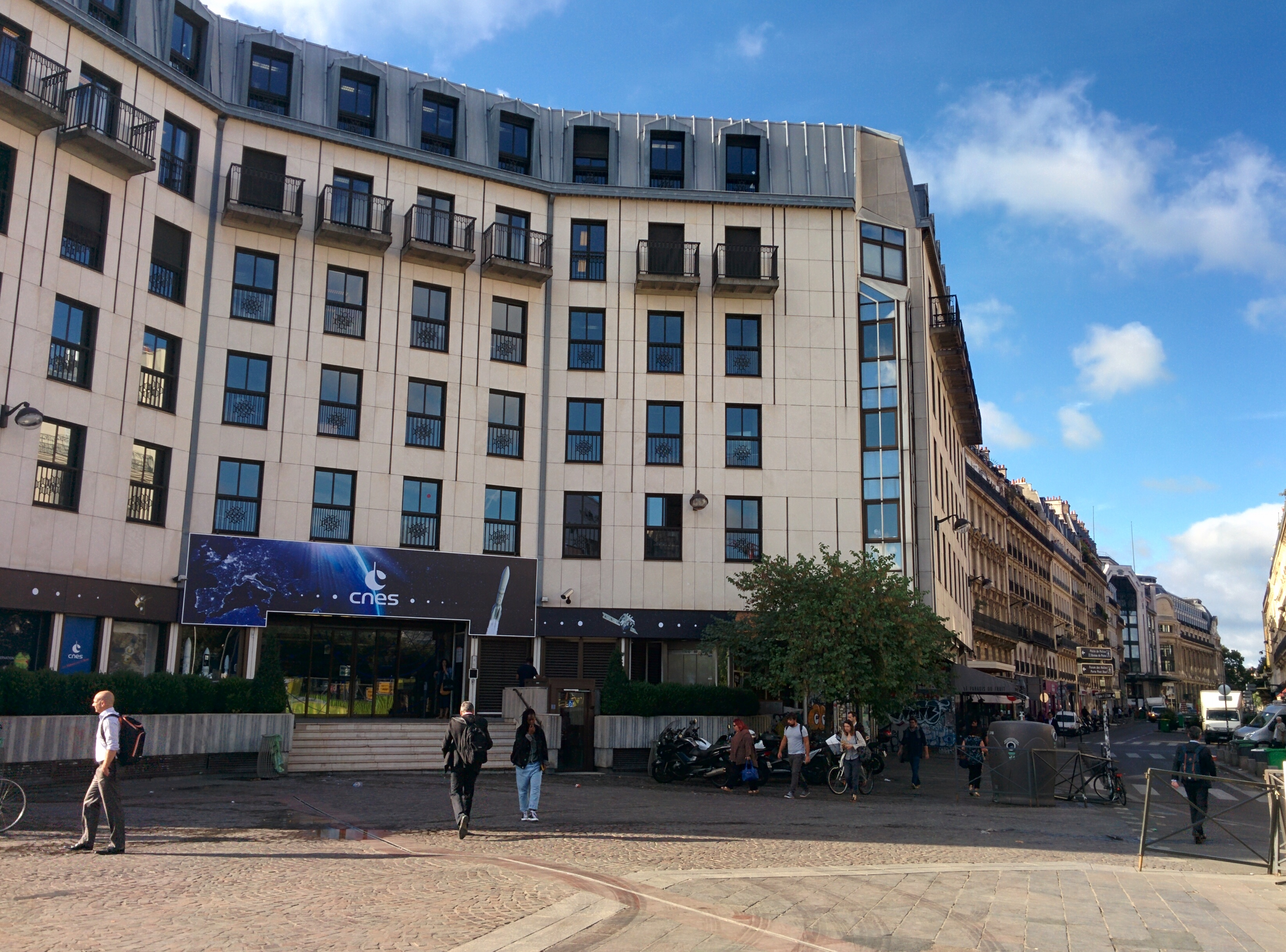 Les bureaux du Centre National d'Etudes Spatiales (Cnes) à Paris (2 Place Maurice Quentin)